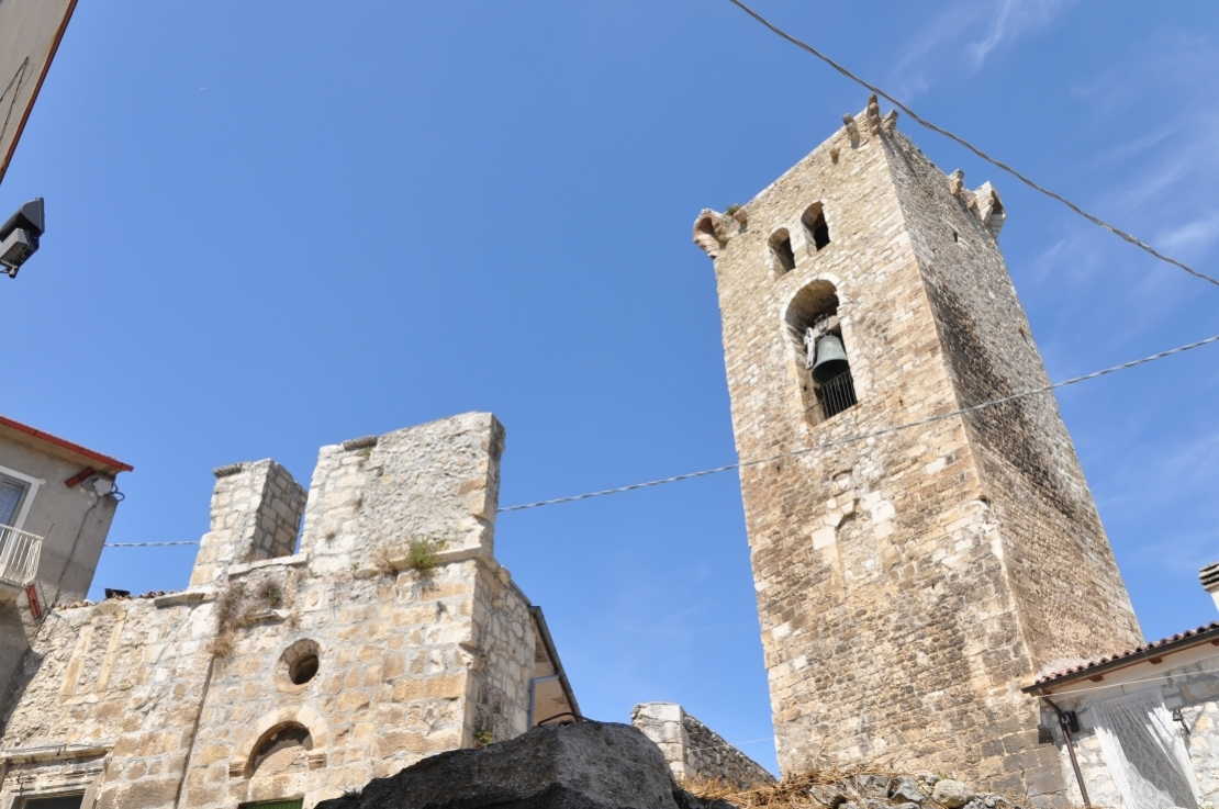 Cocullo 2012